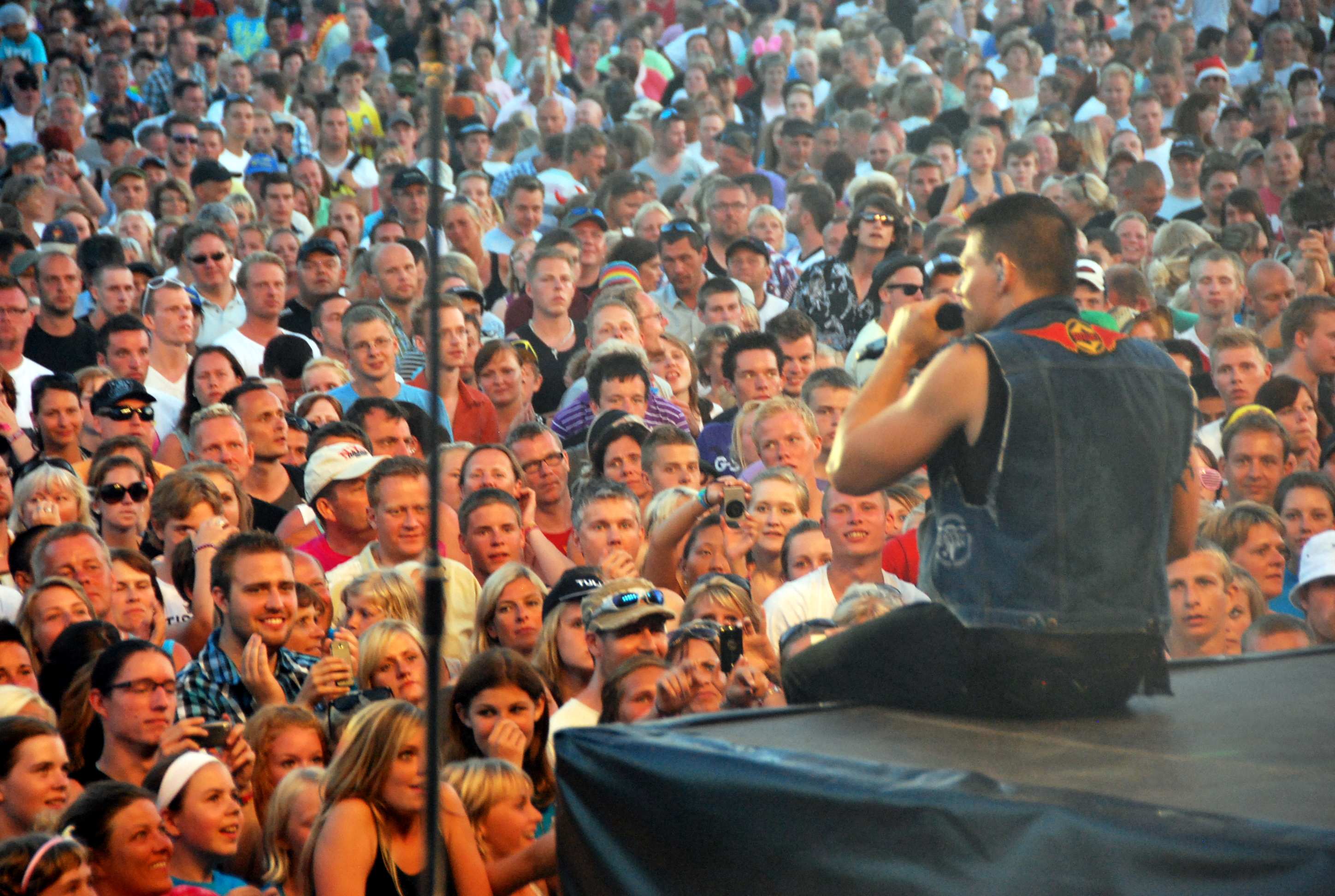 Paw Lagermann under Infernal-koncert på Vig Festival 2010.